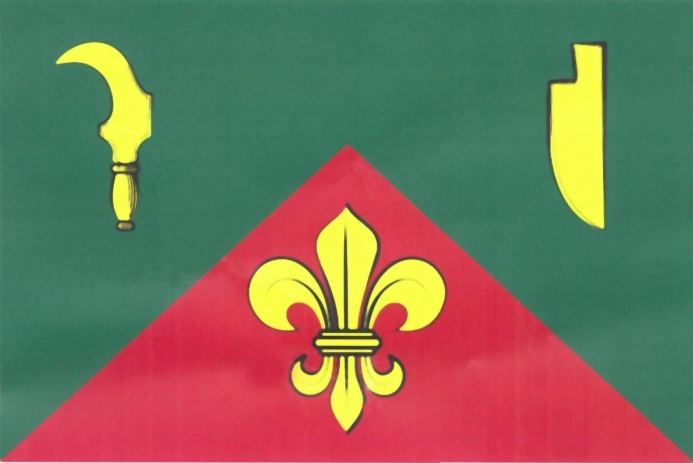 vlajka, Kubšice, okres Znojmo